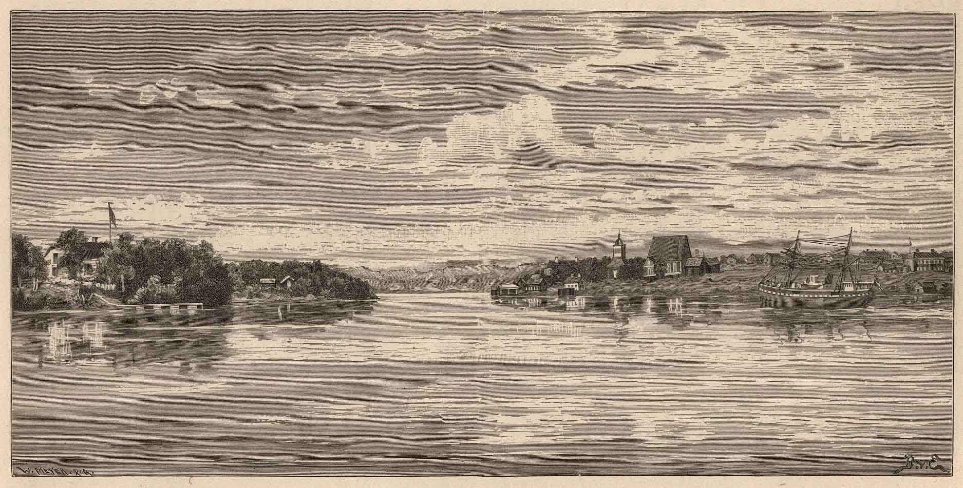 Nederkalix